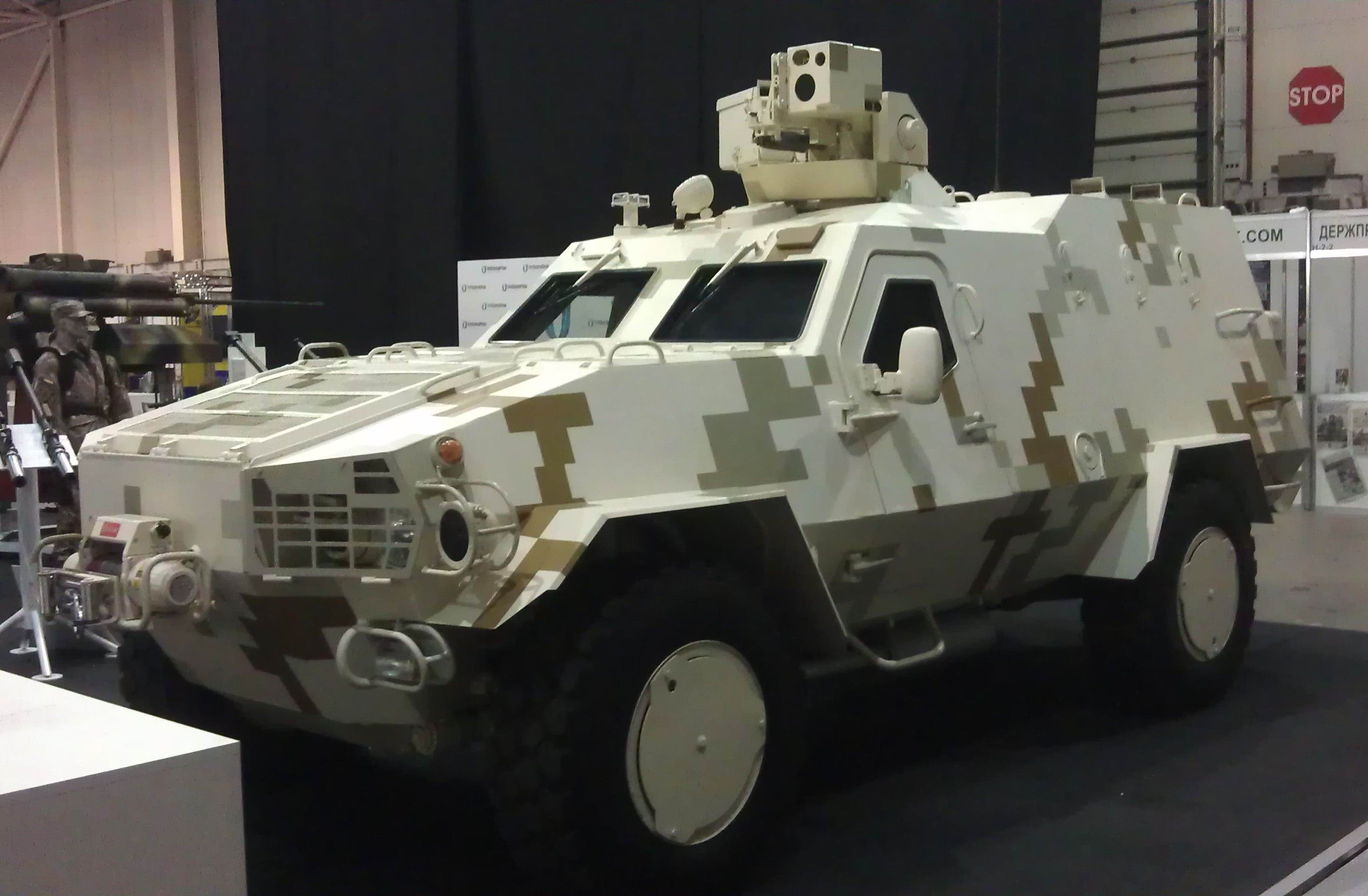 Бронетранспортер "Дозор-Б" на стенде Львовского бронетанкового завода. Выставка "Зброя та безпека", Киев, сентябрь 2015 г.